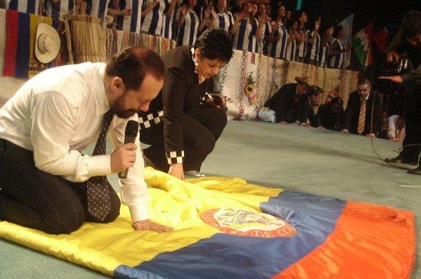 Orando por un Avivamiento para Colombia